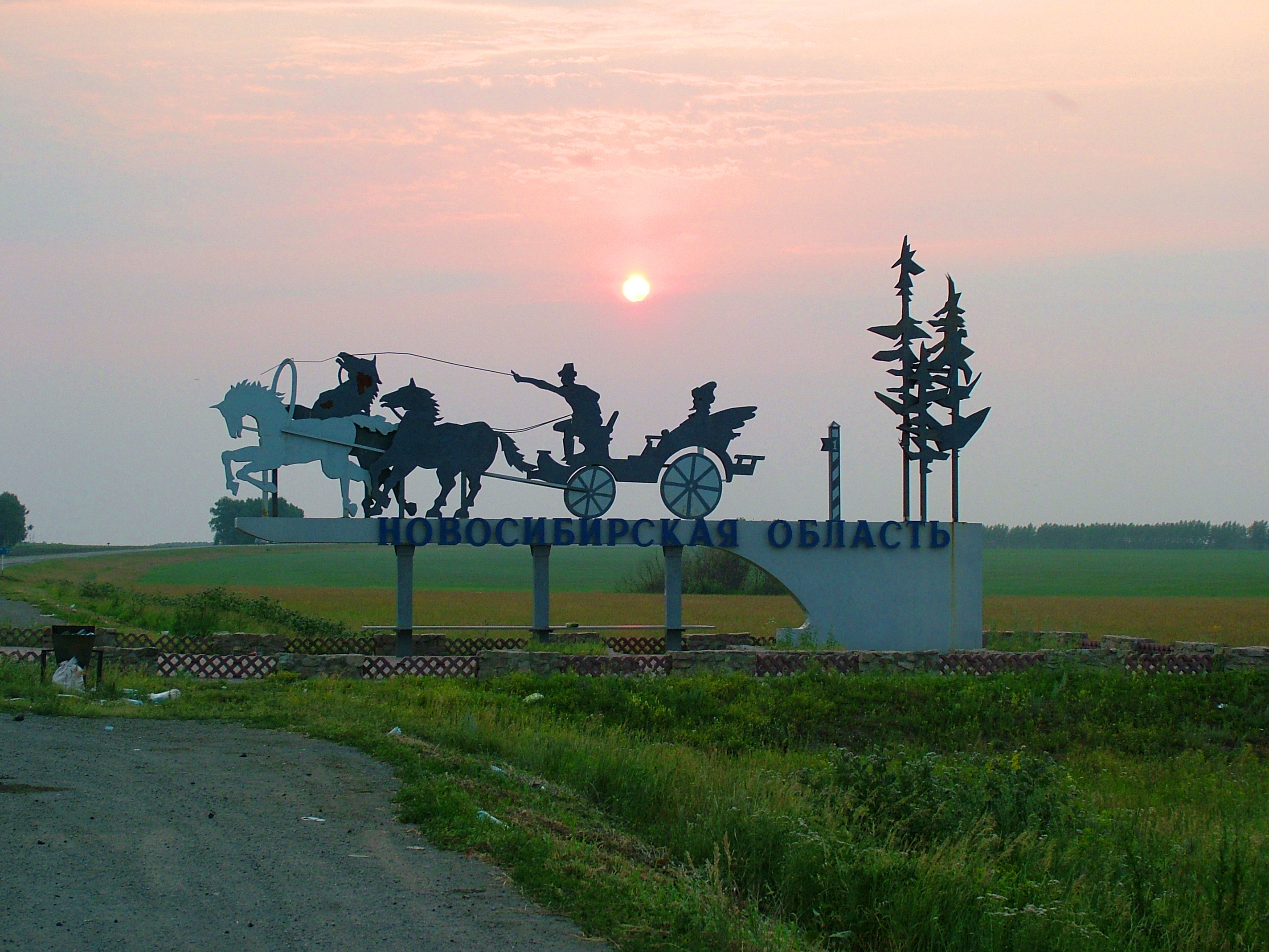 Въезд в Новосибирскую область по трассе М-53